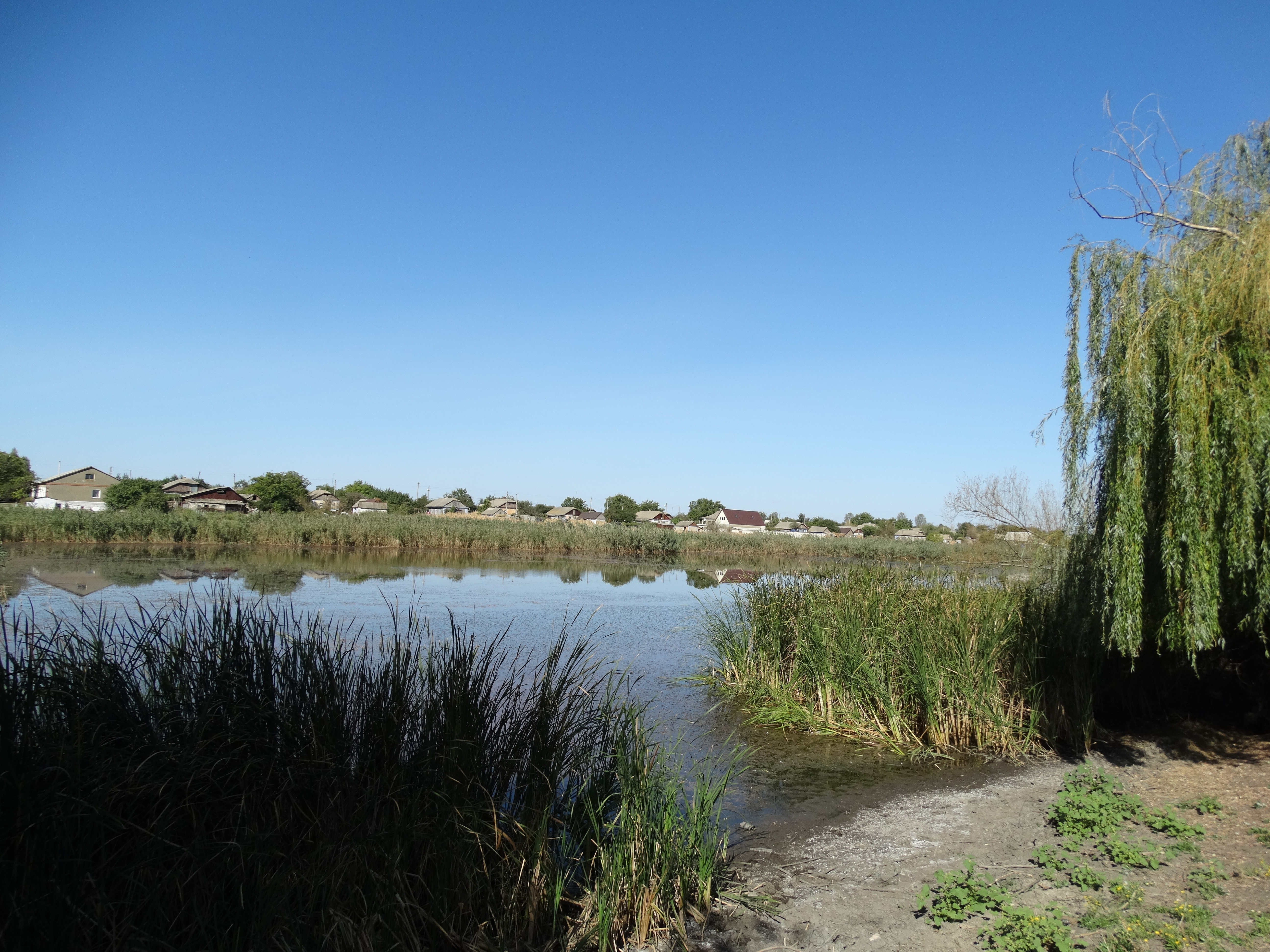 Став на річці Вижна в селі Новосамарка. Вікіекспедиція на північ Одещини